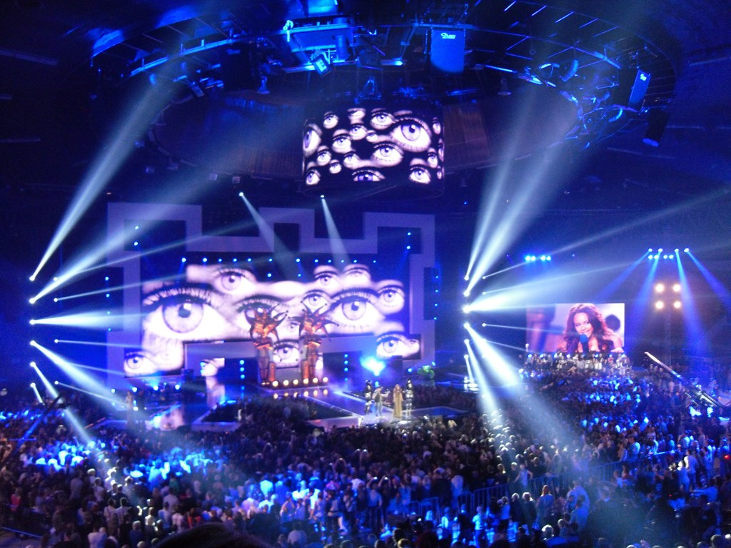 Zdjęcie zrobione podczas Eska Music Awards 2011 w katowickim Spodku.